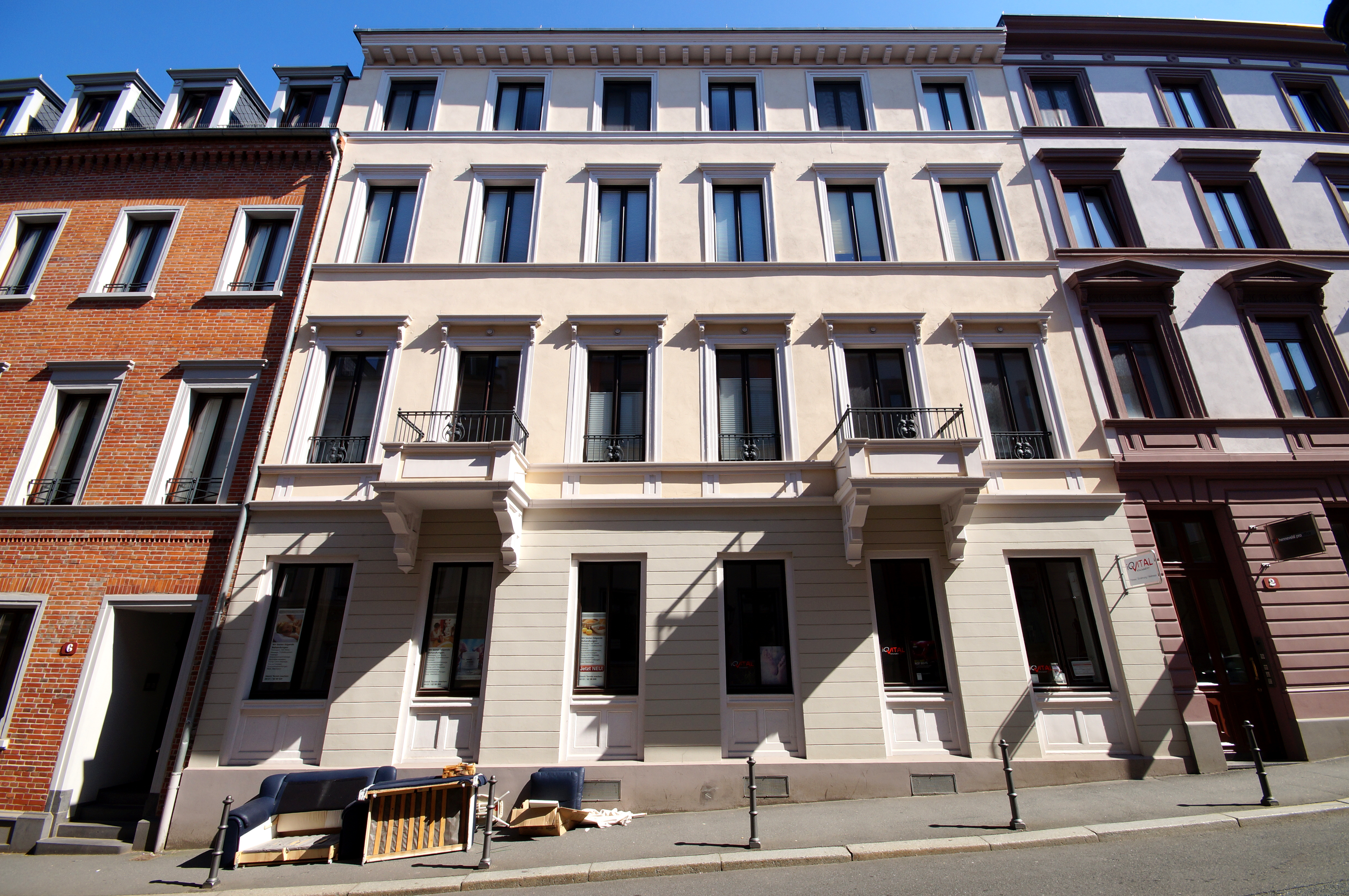 Fassade des Gebäudes Emmerich-Josef-Straße 4 in Mainz-Altstadt